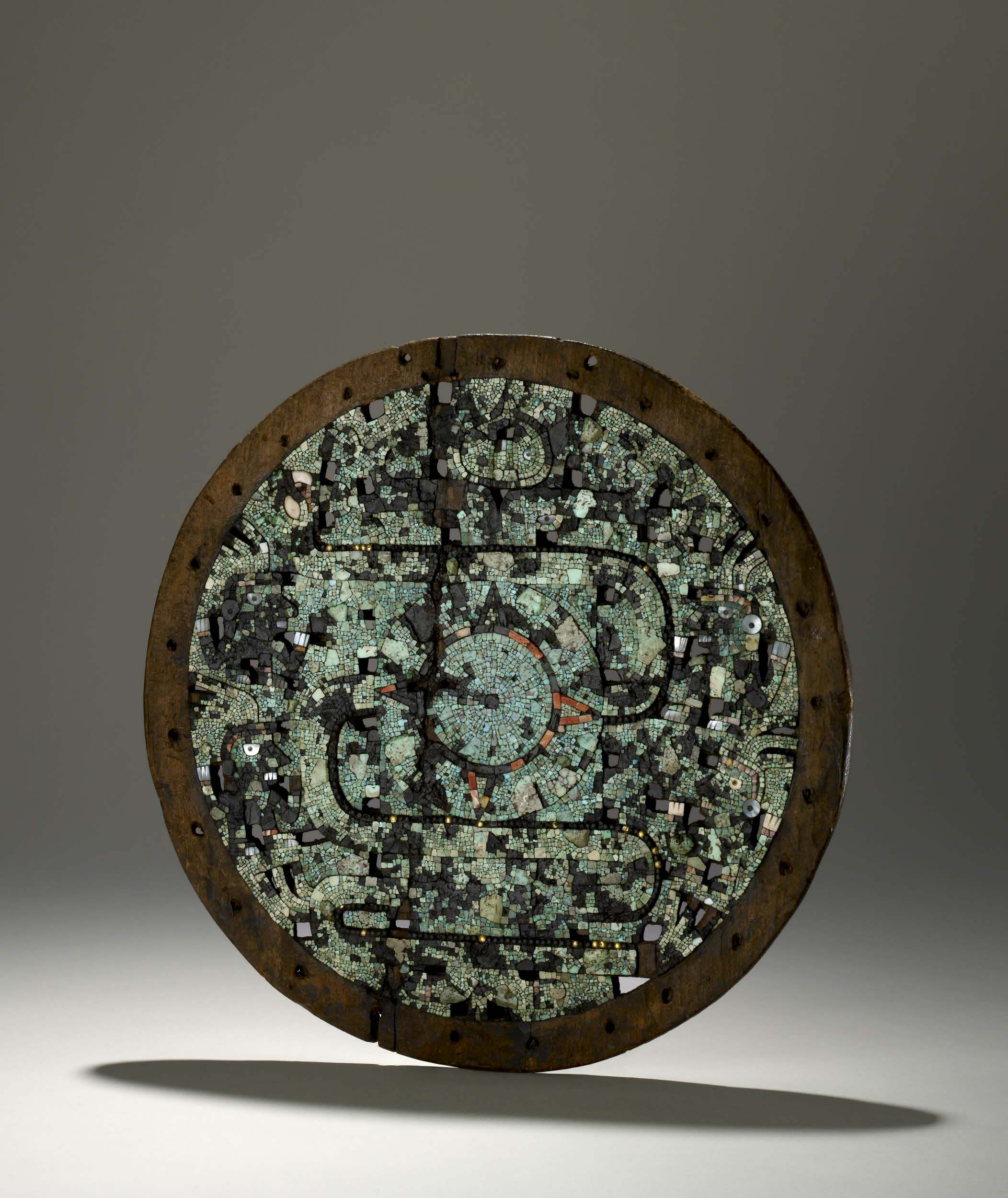 Chimalli mexica (azteca) con manufactura al estilo mixteco actualmente en el Museo Británico.